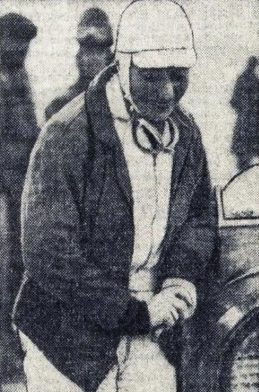 Hellé Nice remporte la Coupe des Dames, au rallye Monte Carlo 1936 (18e au general avec mme J.Marinovitch sur Matford, départ de Tallinn).